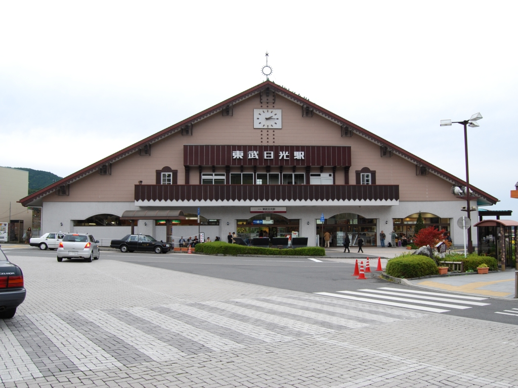 東武鉄道日光線東武日光駅駅舎全景（2008/10/26撮影）